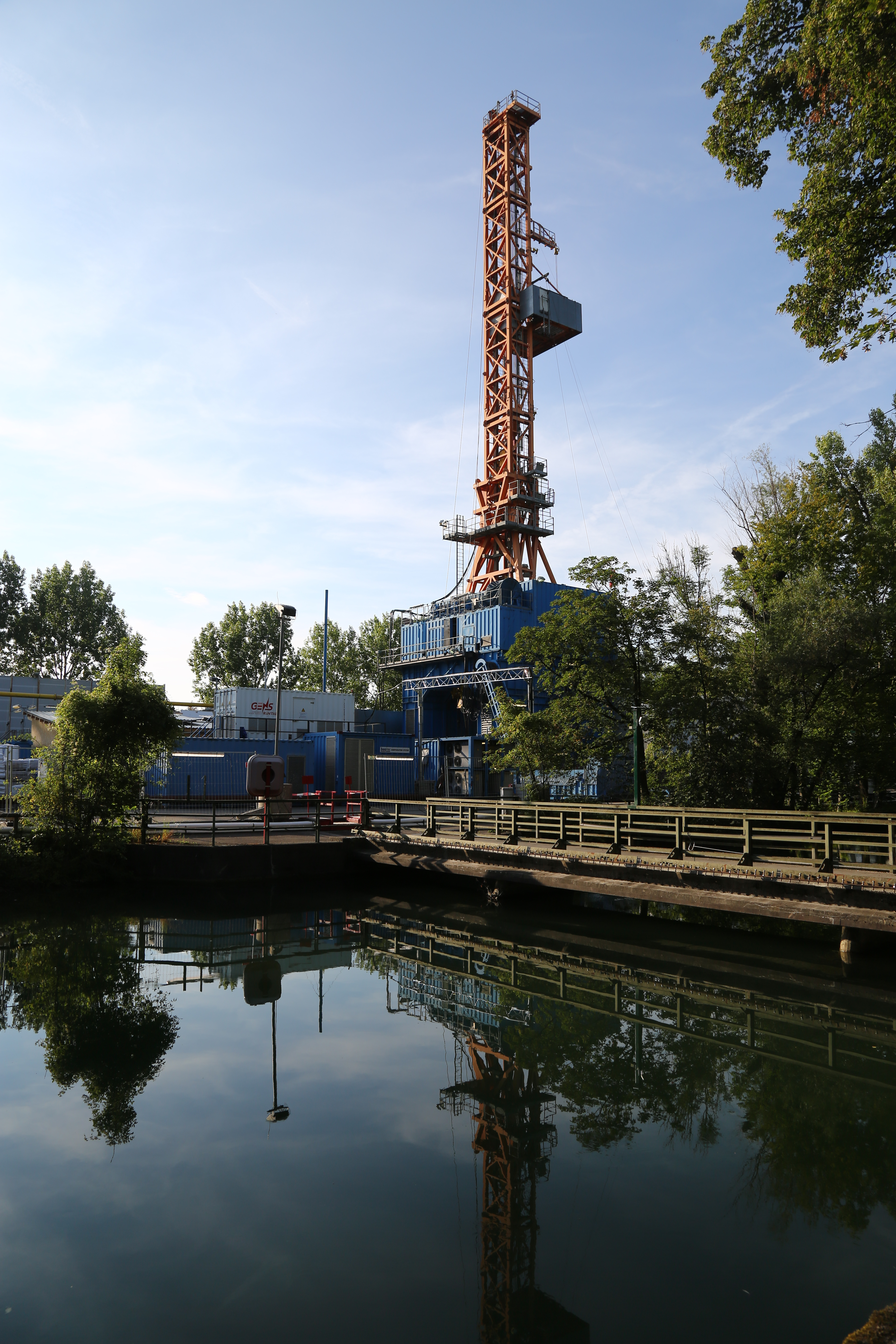 Auf dem Grundstück des Heizkraftwerks München-Süd der Stadtwerke München laufen Bohrungen zur Erschließung der Geothermie-Potentiale im Malm unter der Münchner Schotterebene. Dadurch wollen die Stadtwerke München bis 2040 bei der Heizenergie vollkommen auf Erneuerbare Energien umstellen.